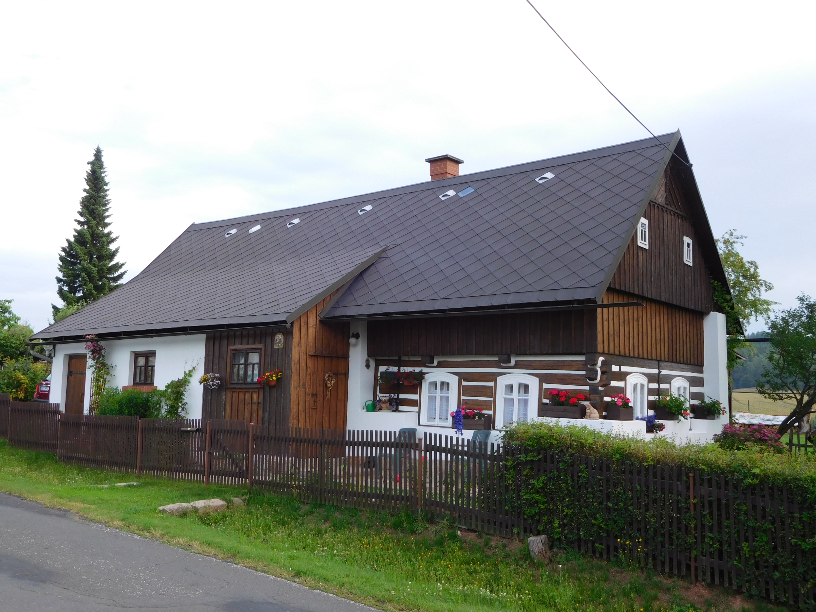 Horní Brusnice - dům č.p. 28